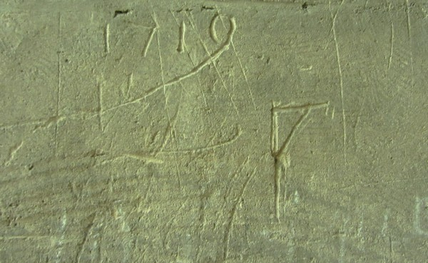 Les piliers de l'église de Saint-Julien du Sault sont couverts de graffitis parfois anciens et très abimés par le lichen